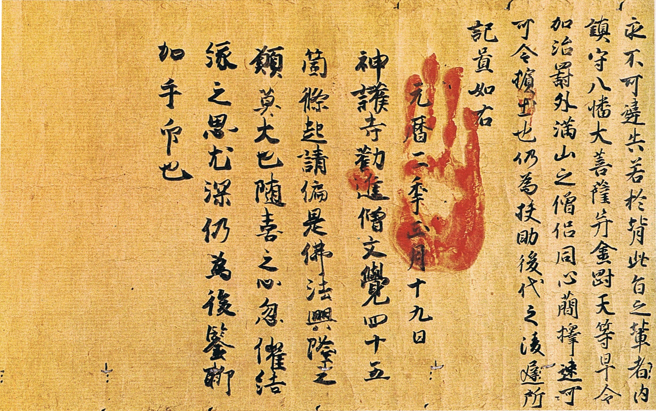 『後白河法皇筆文覚四十五箇条起請文跋』後白河法皇自筆の起請文と手印。文覚の神護寺再興を援助した後白河法皇が文覚の求めに応じて自ら記して起請文の巻首・巻末に朱印を押したもの。